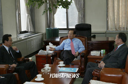 2004년 한나라당 대표실에서 노무현대통령의 탄핵을 추진 논의중인 최병렬 당시 한나라당 대표